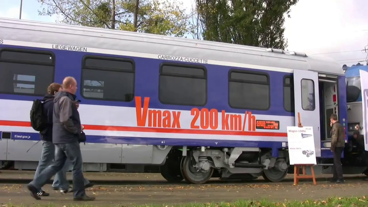 Kuszetka typu 134Ac prezentowana podczas targów Trako 2011 w Gdańsku.